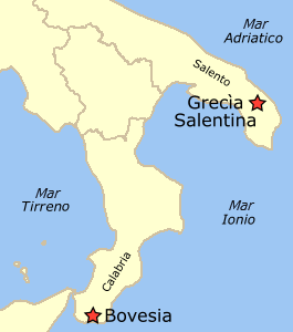 Rifatta sulla versione inglese